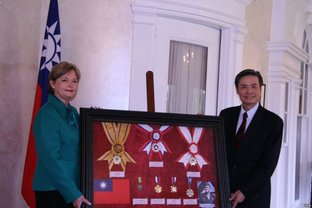 台灣捐贈陳納德博物館複製勳章，由該館館長陳納德外孫女凱樂威接受。